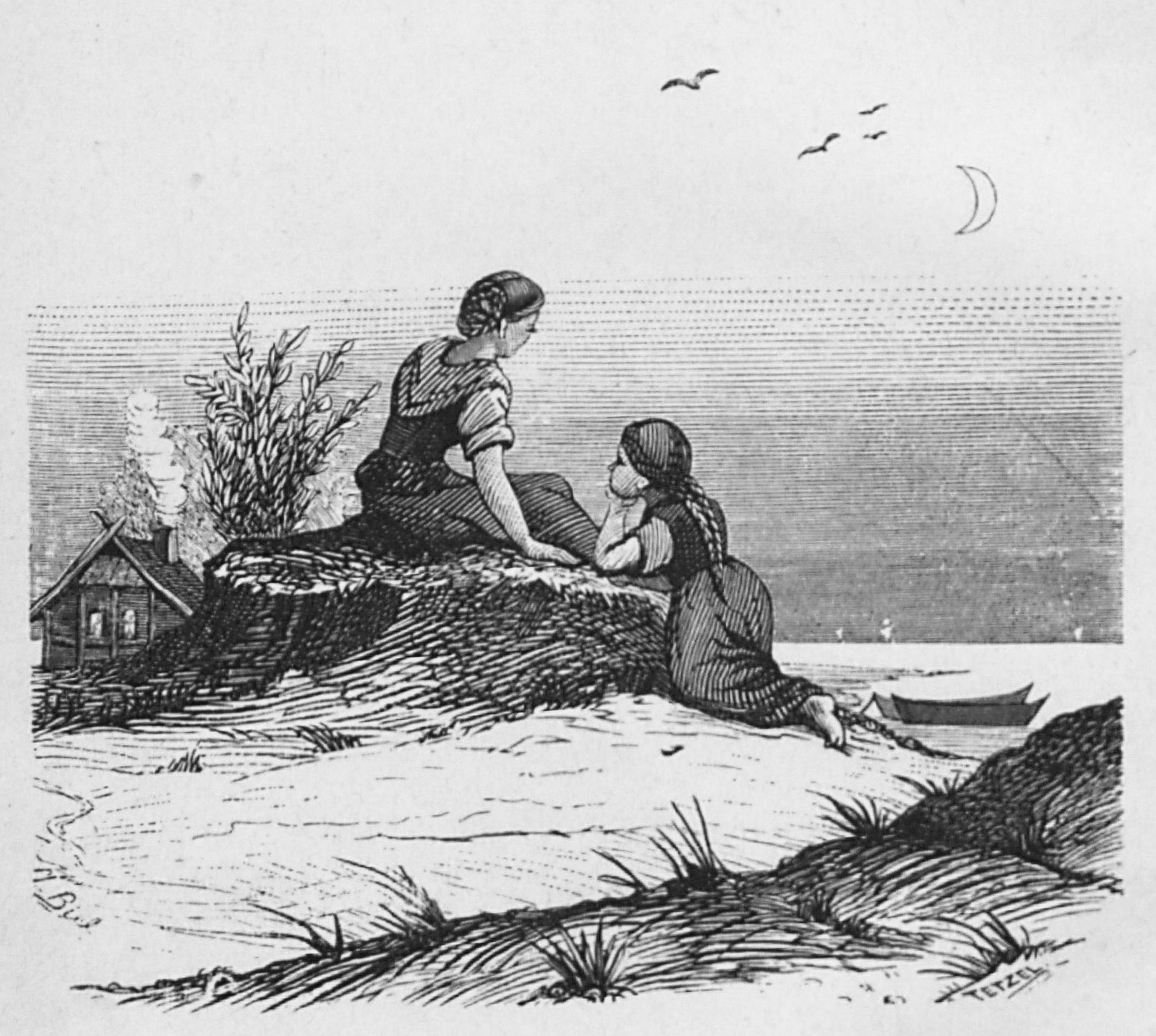 Es handelt sich um eine Illustration nach einer Zeichnung von Antonie Biel in der 1871 gedruckten Ausgabe der Novelle "Eva" von Marie Giese